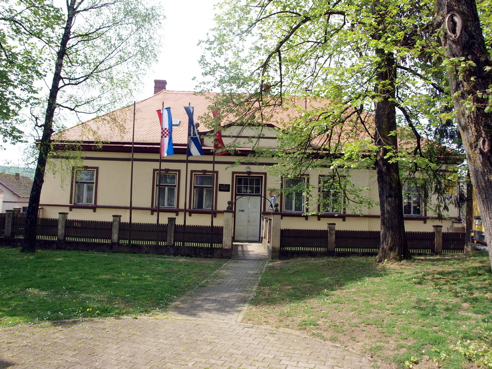 Zgrada Općinskog vijeća u selu Podcrkavlje, Brodsko-posavska županija.